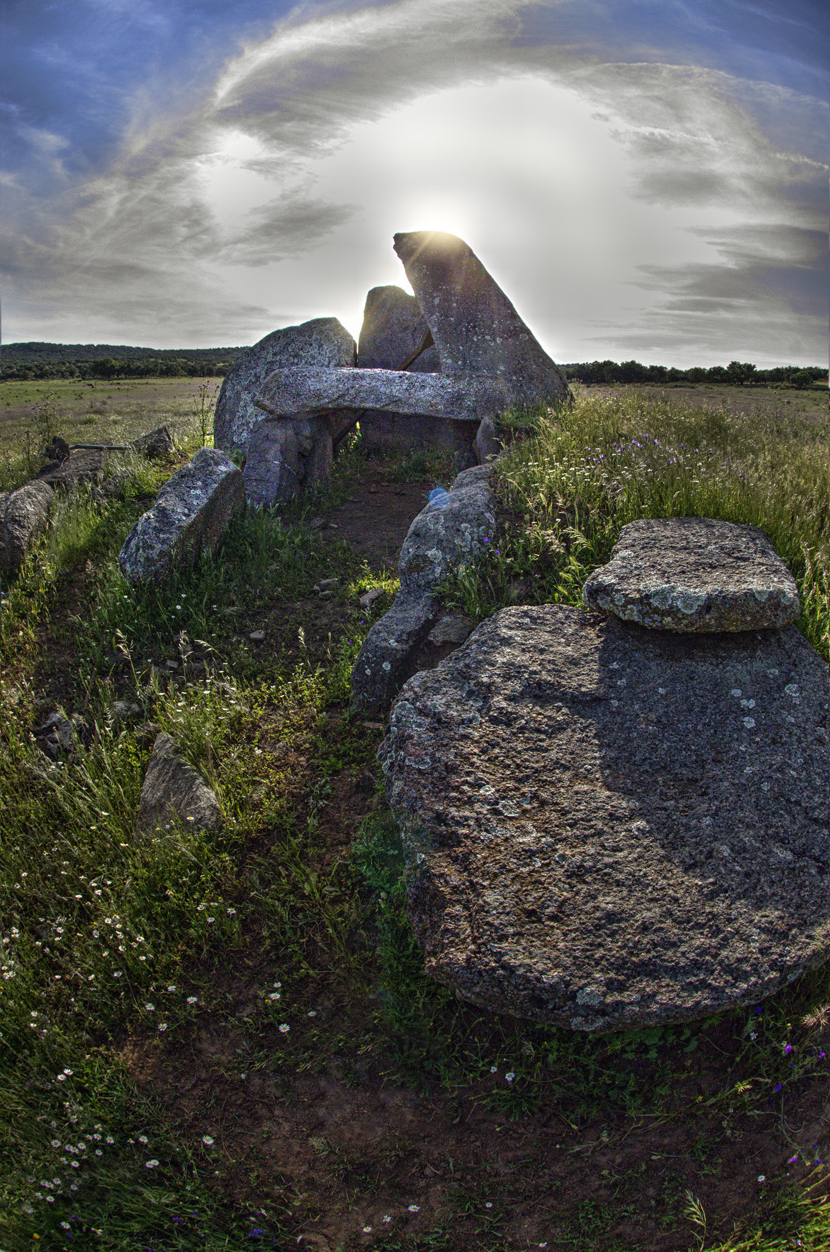 Este dolmen está a unos 5 km de Barcarrota (Badajoz), en una finca privada donde no ponen ningún problema para entrar (si consigues dar con ella). A pesar de los característicos saqueos, se encontraron huesos humanos, cerámica y ídolos placa en una excavación realizada hace unos diez años. Llegué en un mal momento, justo cuando el sol estaba poniéndose y, por tanto, en oposición al corredor de la entrada, orientado al Este. El contraluz fue un tanto forzado pero aún así aprovechable.